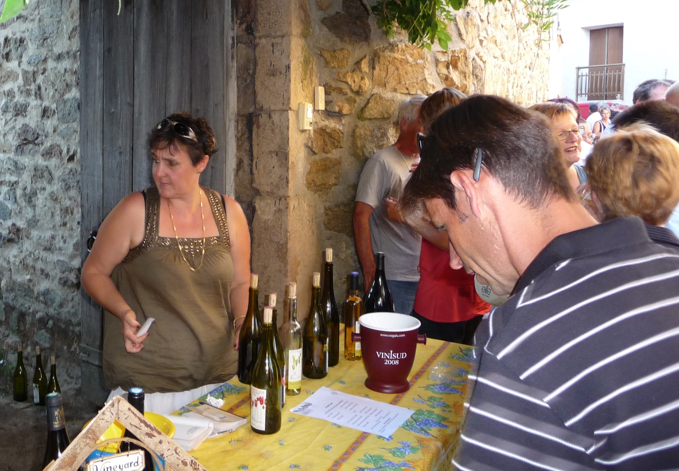 Charnas détail